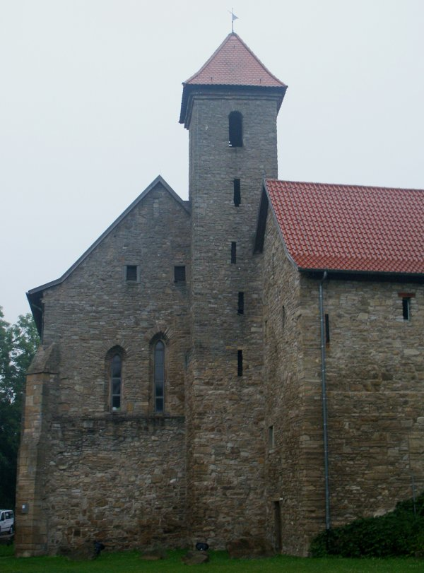 Außenansicht der gotischen Klosterkirche (nördlicher Flügel des Klostergevierts) in Cornberg mit dem angeschlossenen westlichen Flügel